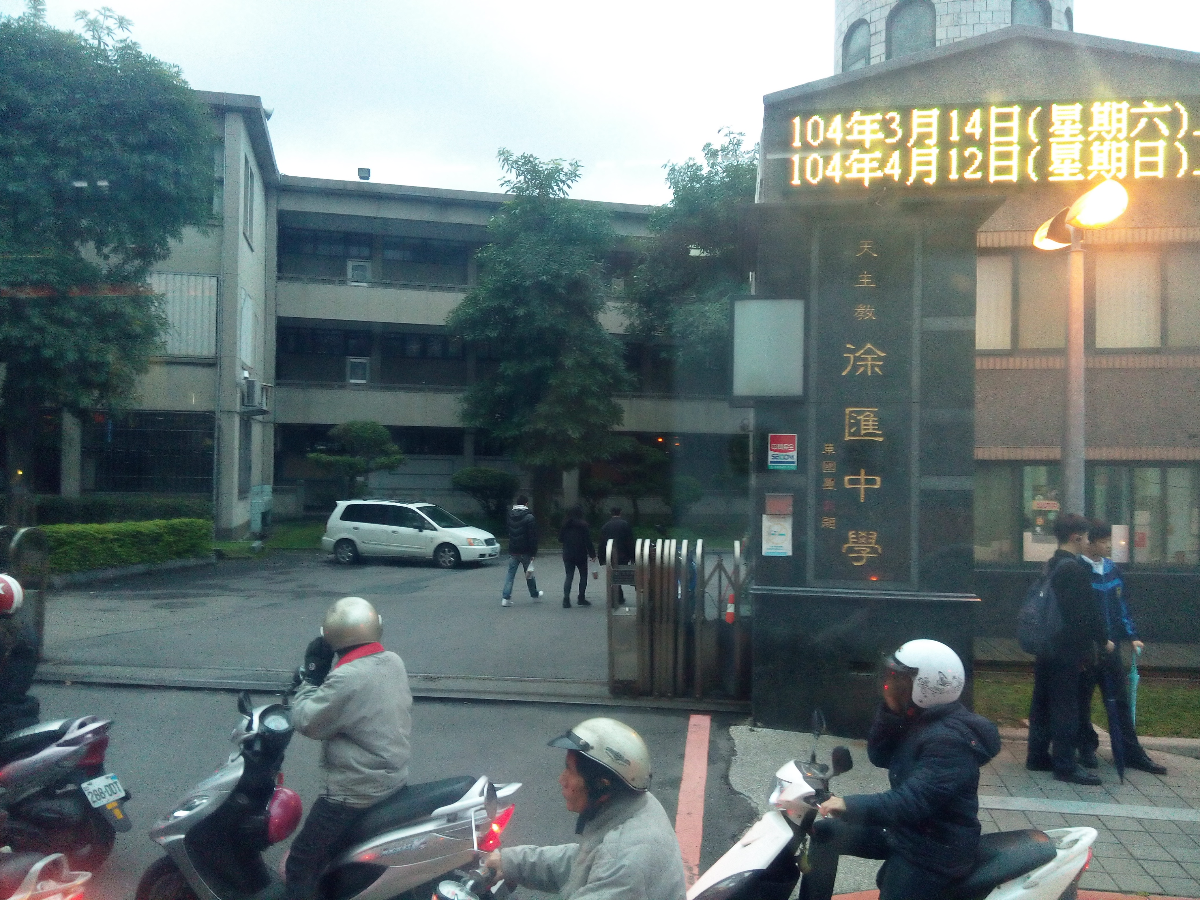 中文（台灣）: 從大客車上拍攝徐匯中學側門。